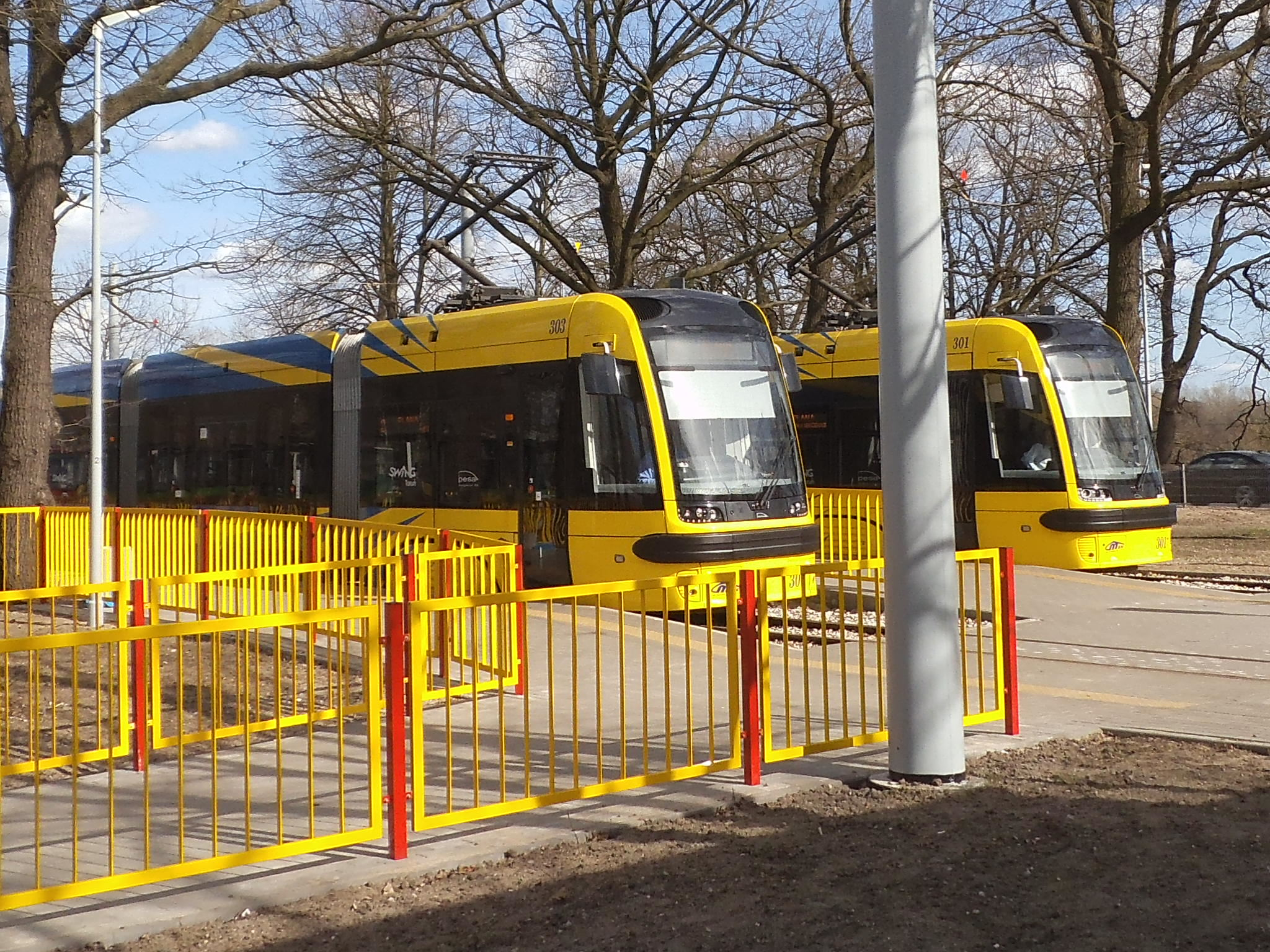 Toruńskie składy typu Swing